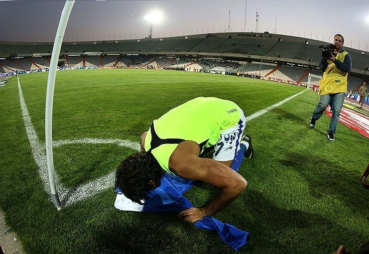 خداحافظی مجیدی از فوتبال در دیدار تیمهای استقلال و مس کرمان